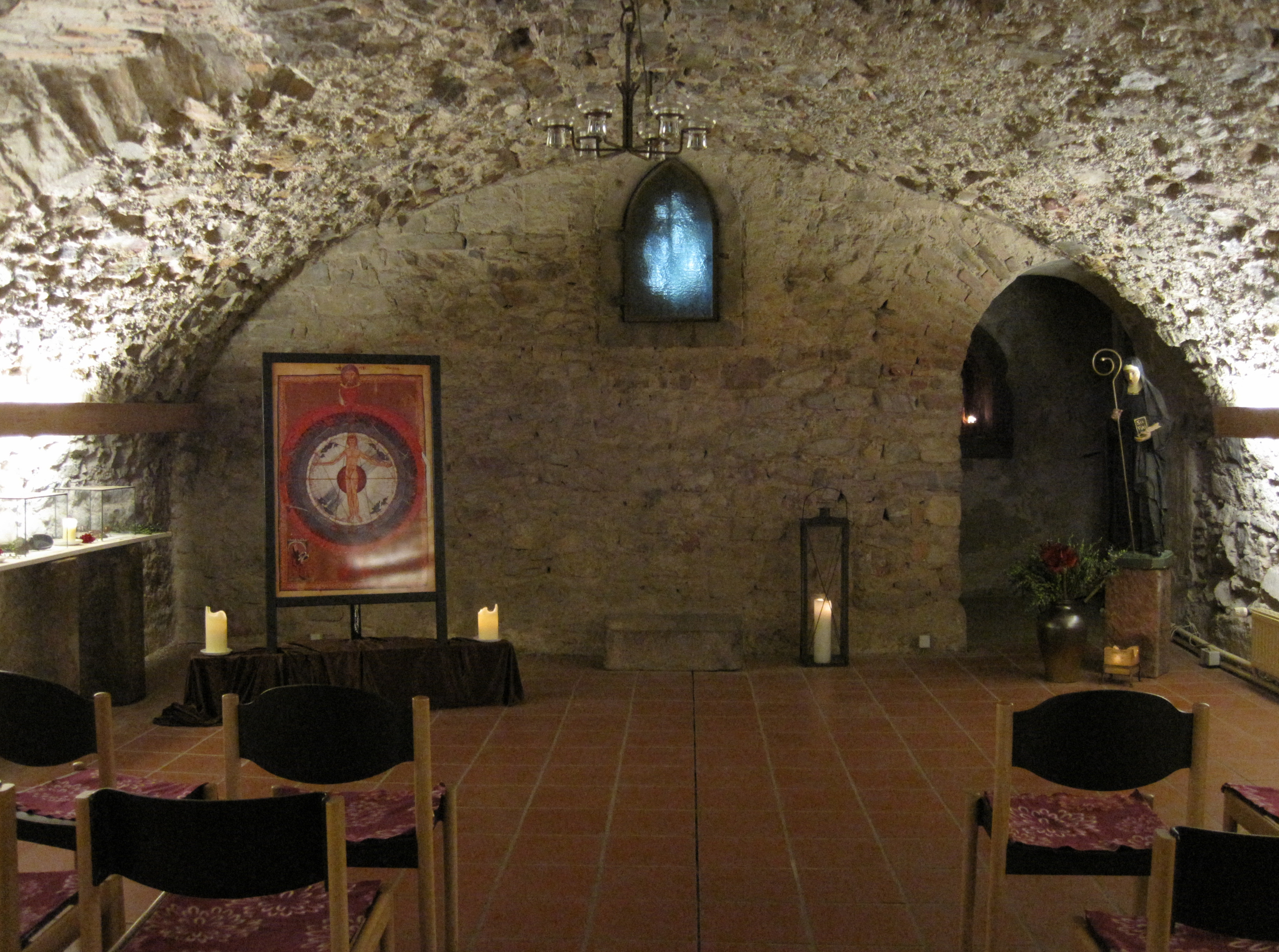 Rupertsberger Gewölbe: Gewölbereste des Klosters Rupertsberg der Hildegard von Bingen, Bingen-Bingerbrück, Rheinland-Pfalz.